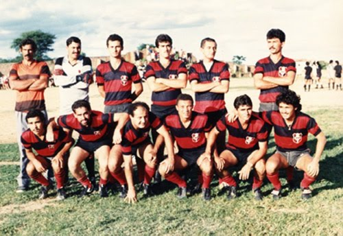 1985. Foto do time campeão tabirense. Em pé: Moacir (Técnico), Beba, Betinho, Etinho, Tuta e Adelmo. Agachados: Paulo, Beton, Élsio, Cachimbo, Claudino e Dunga.